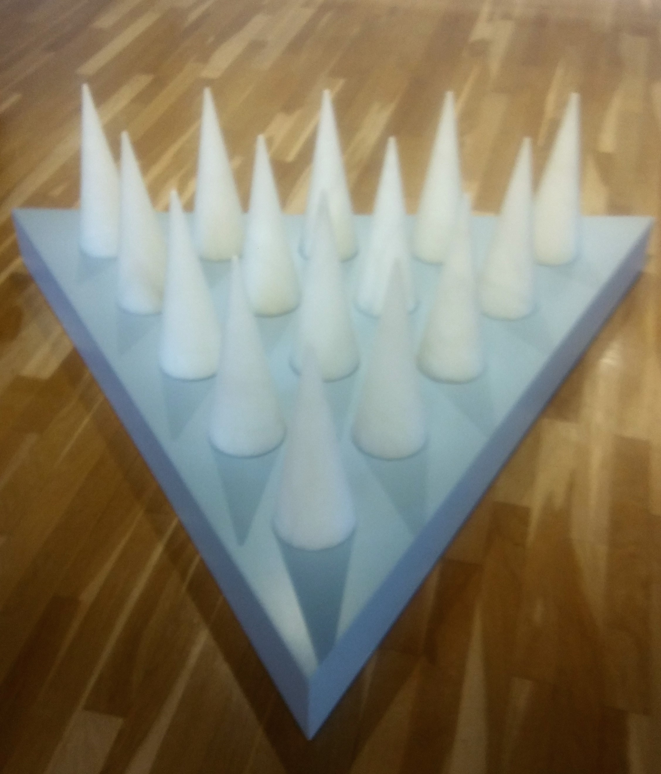 María Jesús Cueto. "Homenaje a Tartaglia". Alabastro y DM. 15 módulos (cilindros) de 34 cm x 13cm. Museo de Arte e Historia de Durango (Vizcaya)